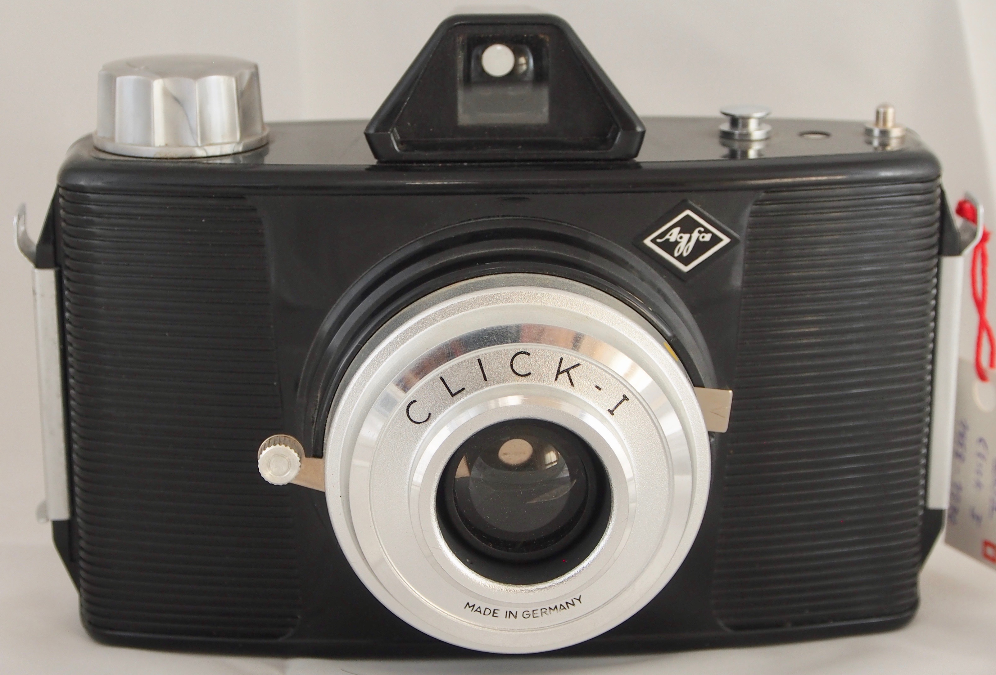 Click I Kadl# 1293